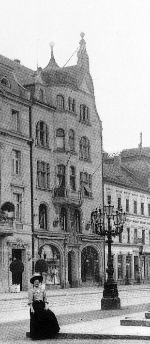 Geschäfts- und Wohnhaus Alleestraße 38 (heute- Heinrich-Heine-Allee) in Düsseldorf, erbaut vor 1904, Architekt Philipp Fischer, Bauherr P. J. Stübben. .jpg